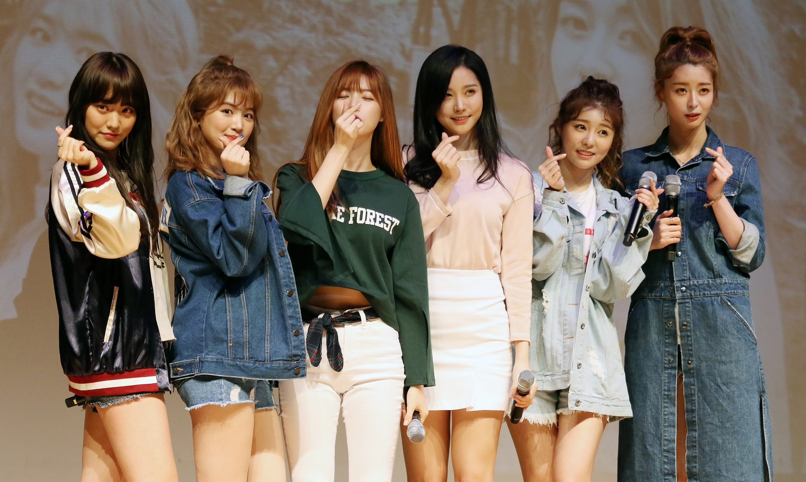 160508 헬로비너스 팬미팅